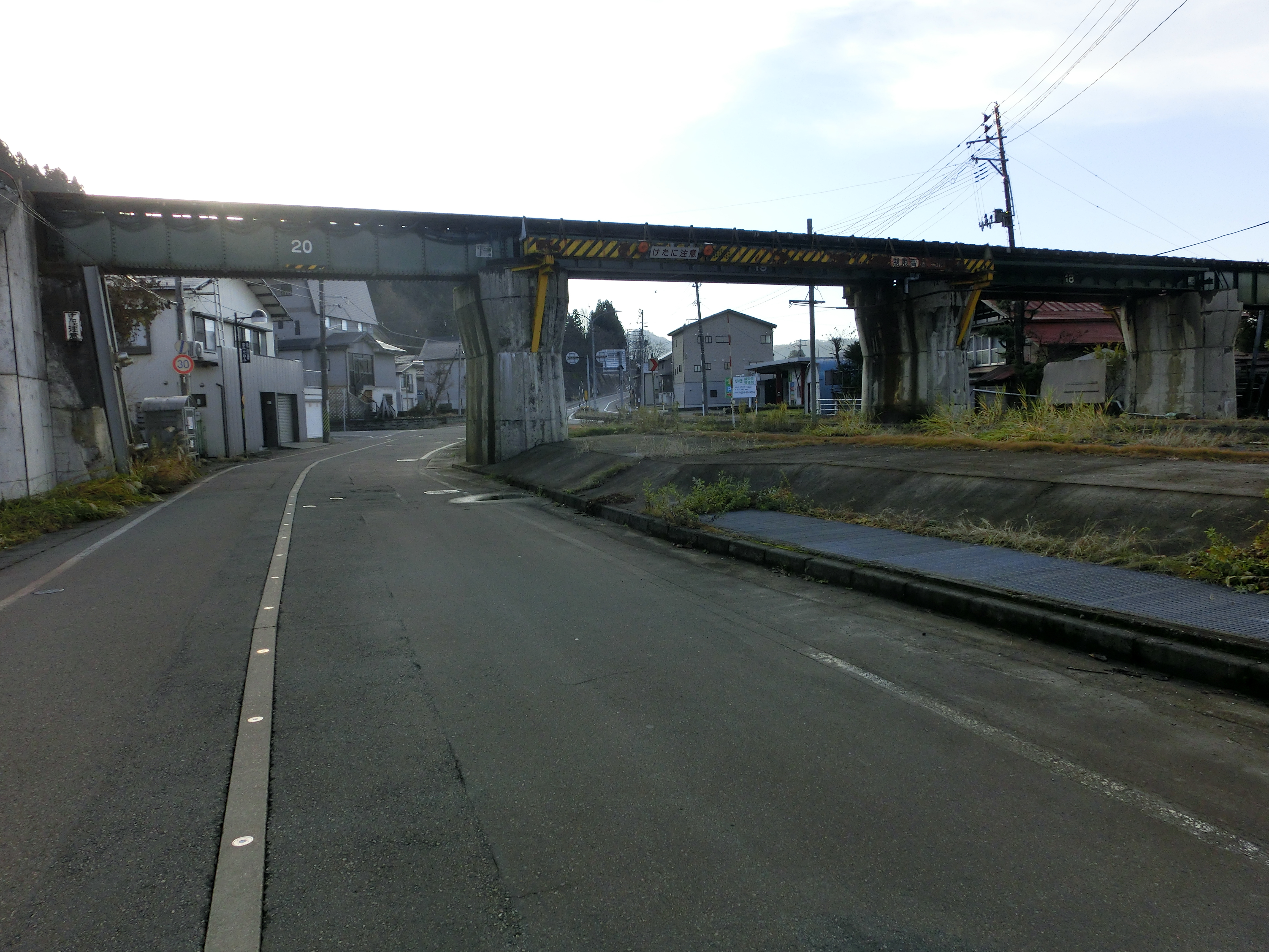 この画像は2017年12月10日早朝、新潟県長岡市東川口にて撮影された飯山線魚野川橋梁東詰（新潟県道71号小千谷川口大和線および国道17号をまたいでいる桁部）の写真。